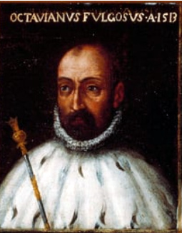 Dipinto del doge Ottaviano Fregoso